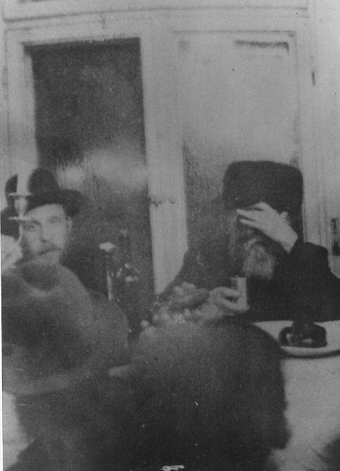 הריי"צ בבר מצוה של הנכד בארי גוראריה